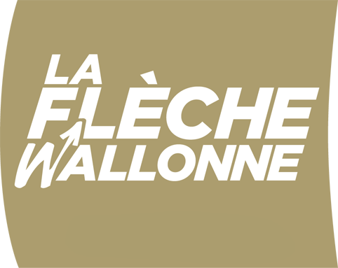 Logo von La Flèche Wallonne